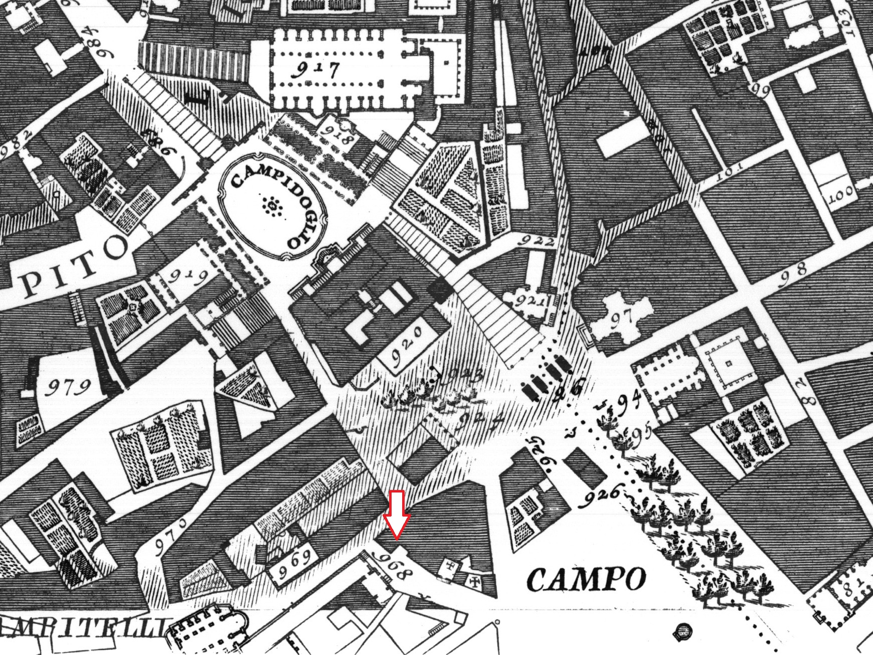 Santa Maria delle Grazie al Foro Romano